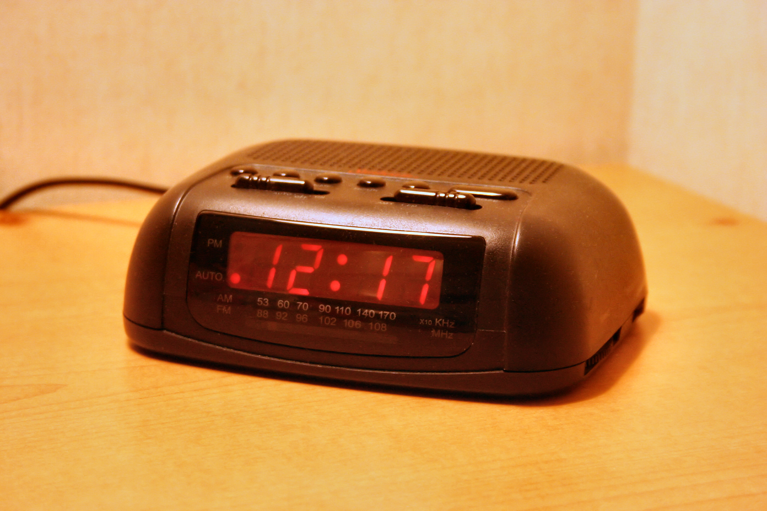 A basic digital clock radio with analog tuning. Digital clock of a basic design commonly found in hotels. Photo shot by Derek Jensen (Tysto), 2005-September-29